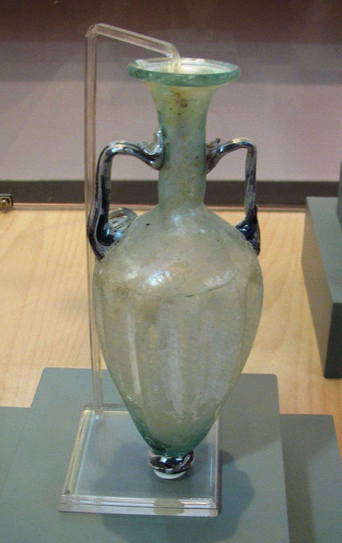 Findings from Hirbet Casra - In Castra Museum, Haifa Israel ממצאים צהאתר הארכאולוגי חירבת קסטרא, היום נמצאים במוזיאון קסטרא העתיקה הנמצא בקניון קסטרא בחיפה קנקנית מזכוכית, תקופה רומית מאוחרת-ביזנטית מאות רביעית-חמישית לספירה